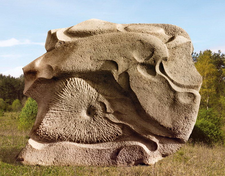 Աստեղային ժամ, Իջևան 1/8